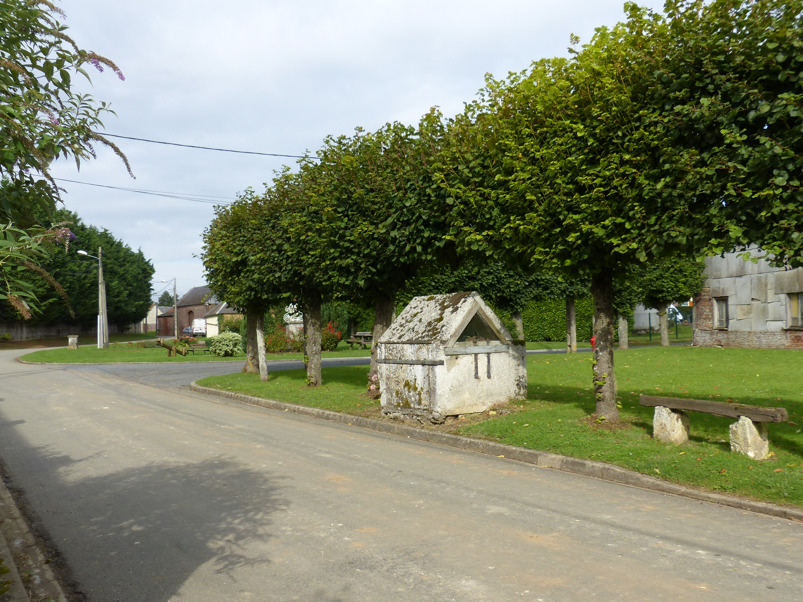 Puits, en face de la mairie de Choqueuse-les-Banards